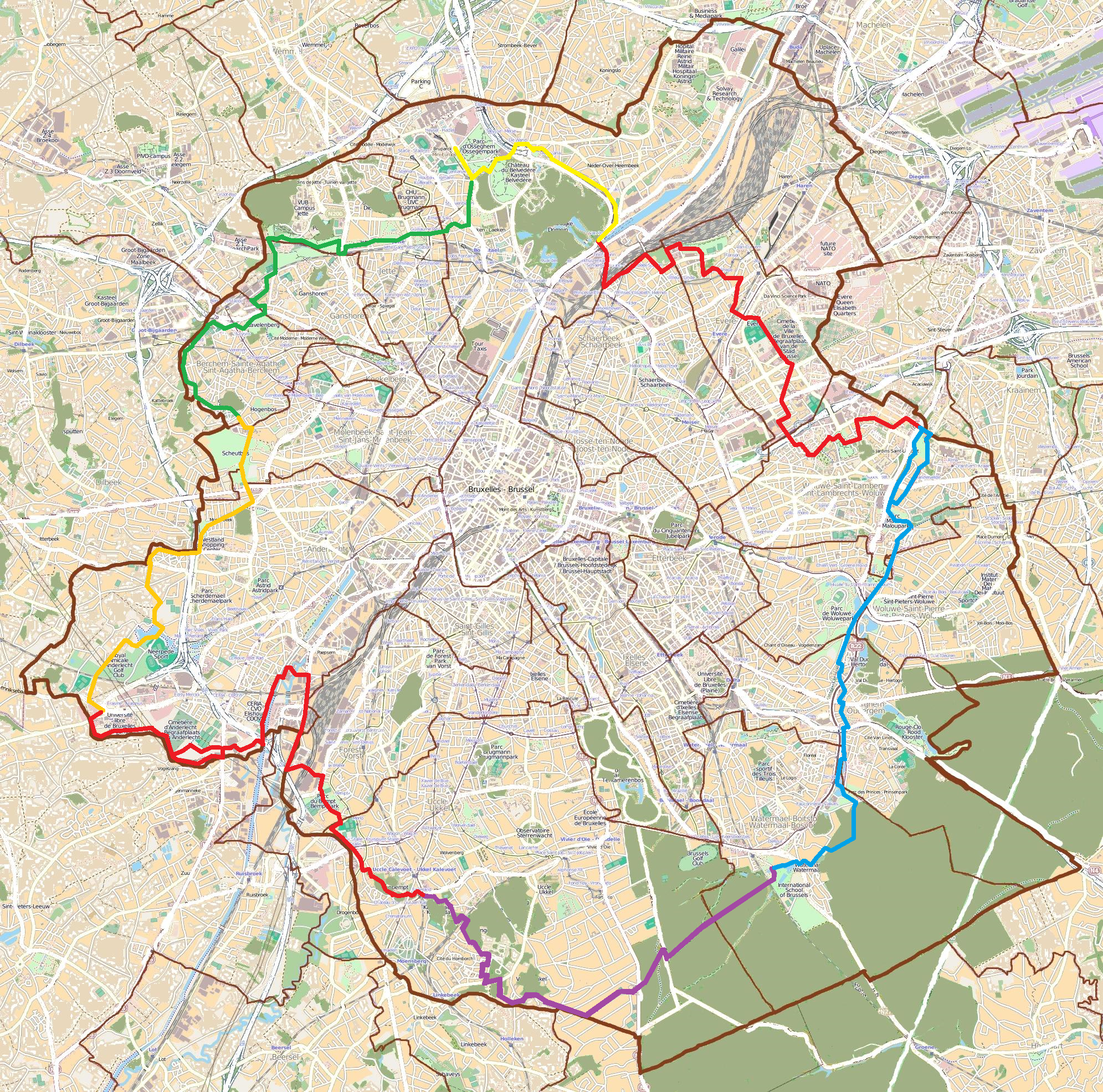 Tracé de la « promenade verte » autour de la Région de Bruxelles-Capitale